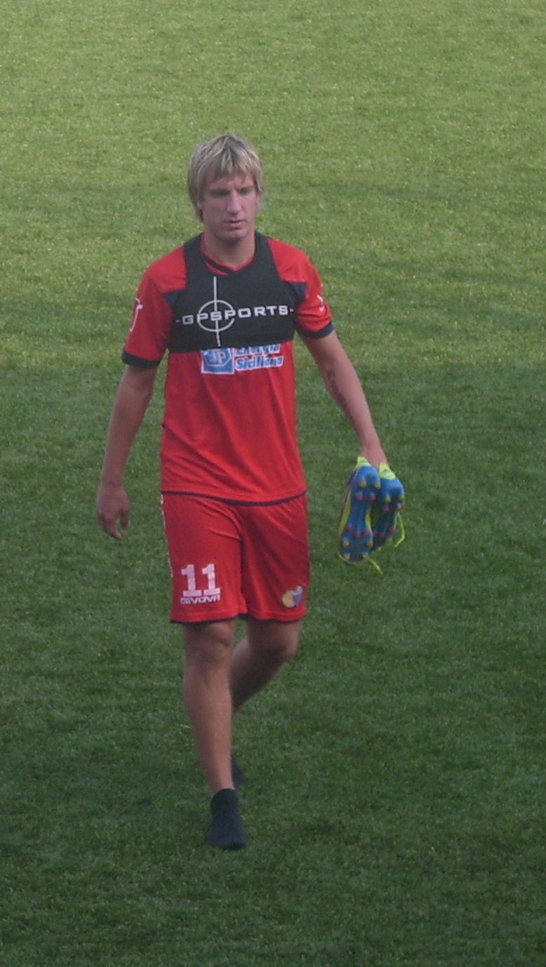 Maxi Lopez al centro sportivo di Torre del Grifo Village